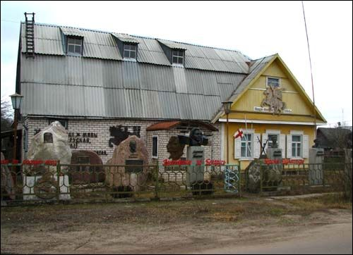 Музей Анатоля Белого в г. Старые Дороги Минской области, РБ